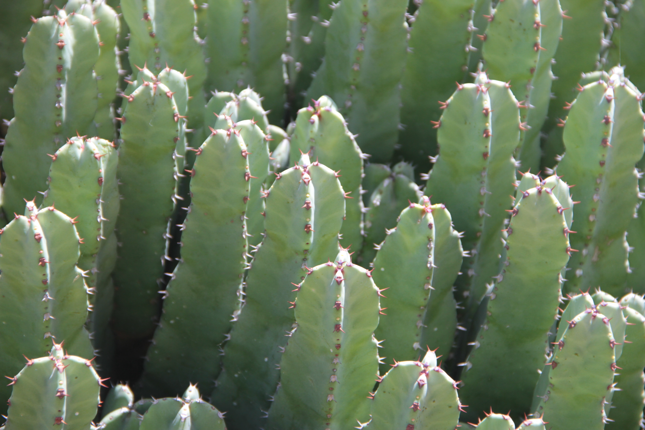 Euphorbia resinifera. Сольєрський ботанічний сад